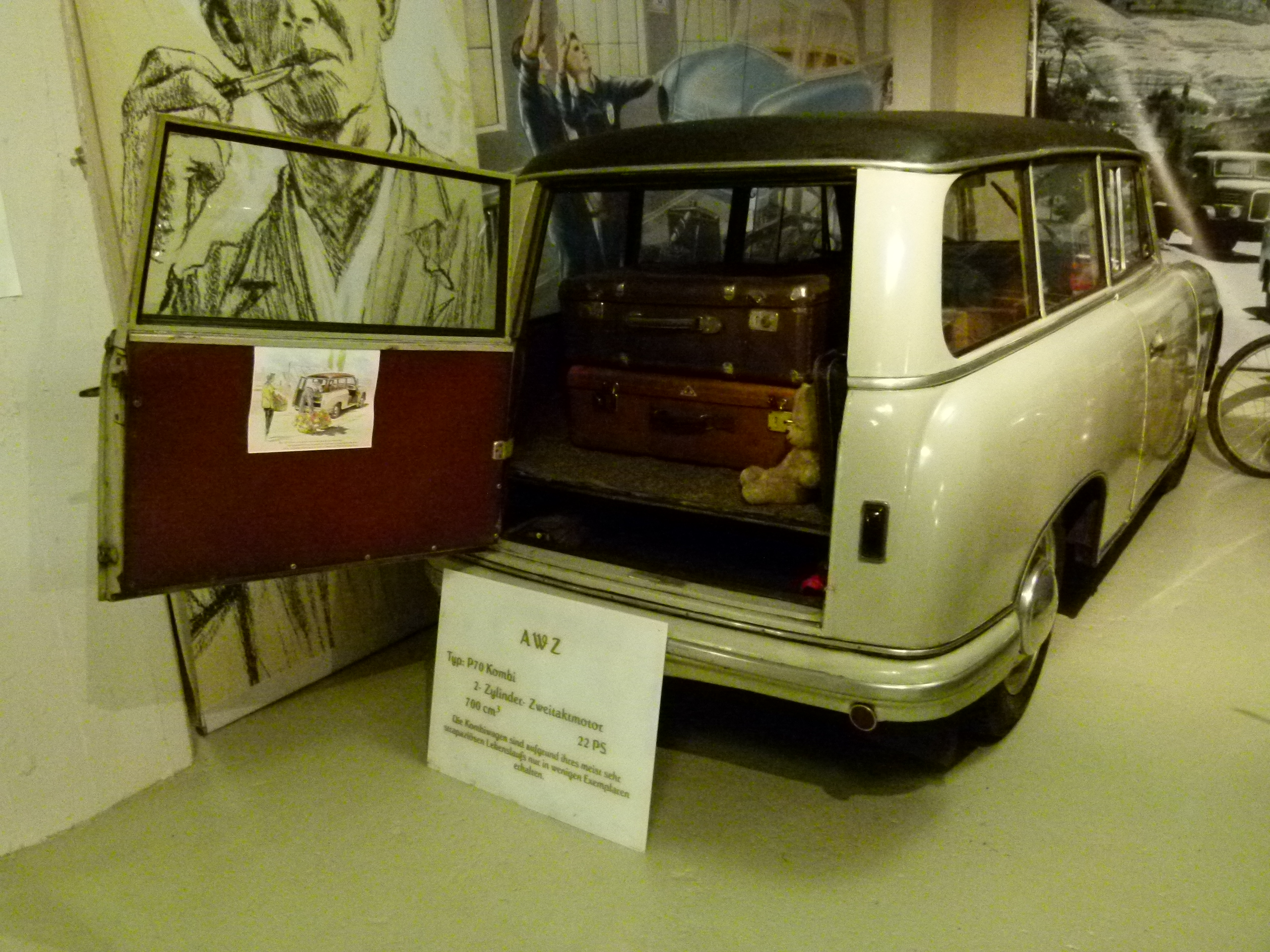 AWZ P70 Kombi, Fahrzeugmuseum Chemnitz